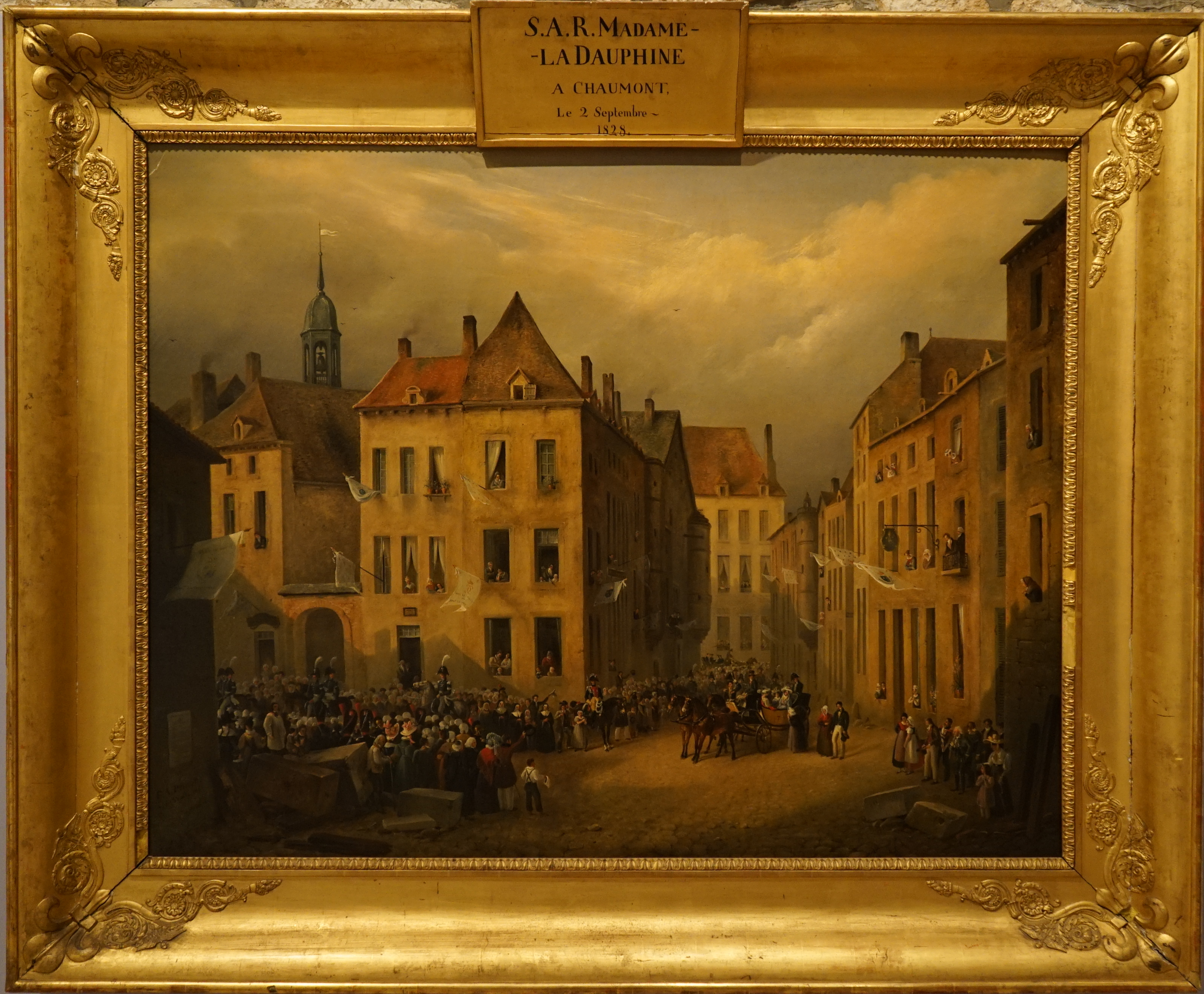 présenté au musée de Chaumont.